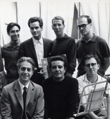 Vacanze Musicali di Venezia (nella foto d’apertura, scattata in occasione delle Vacanze Musicali 1965, si vedono, seduti, da sinistra: Franco Ferrara, Gabrio Gandini, Jesus Lopez-Cobos e, in piedi, Riccardo Muti, Dario Indrigo, Helmut Imig e il sottoscritto).